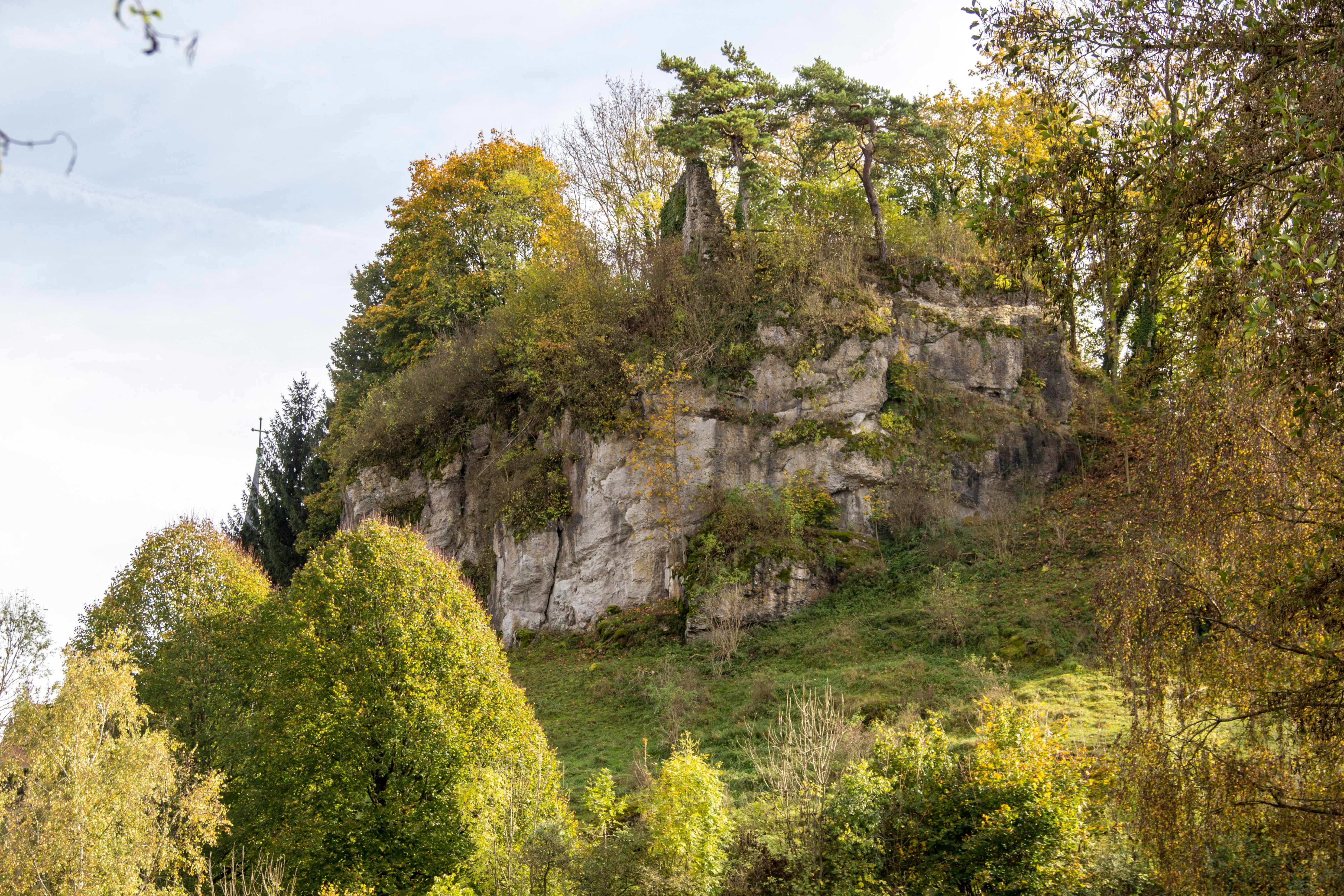 Burgfelsen, Thuisbrunn, Geotop